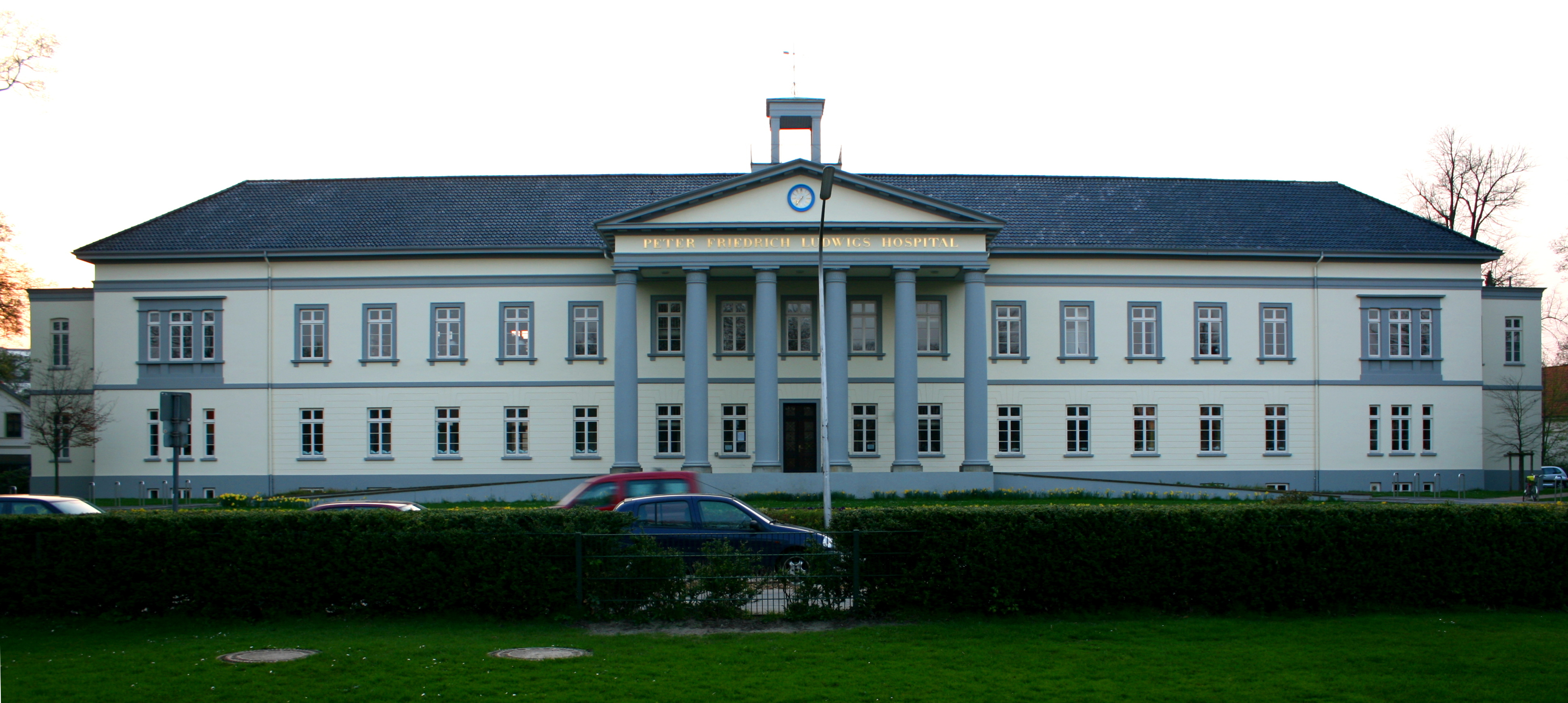 Peter Friedrich Ludwig Hospital in Oldenburg, Niedersachsen. Heute als Gebäude der Stadtbibliothek Oldenburg genutzt